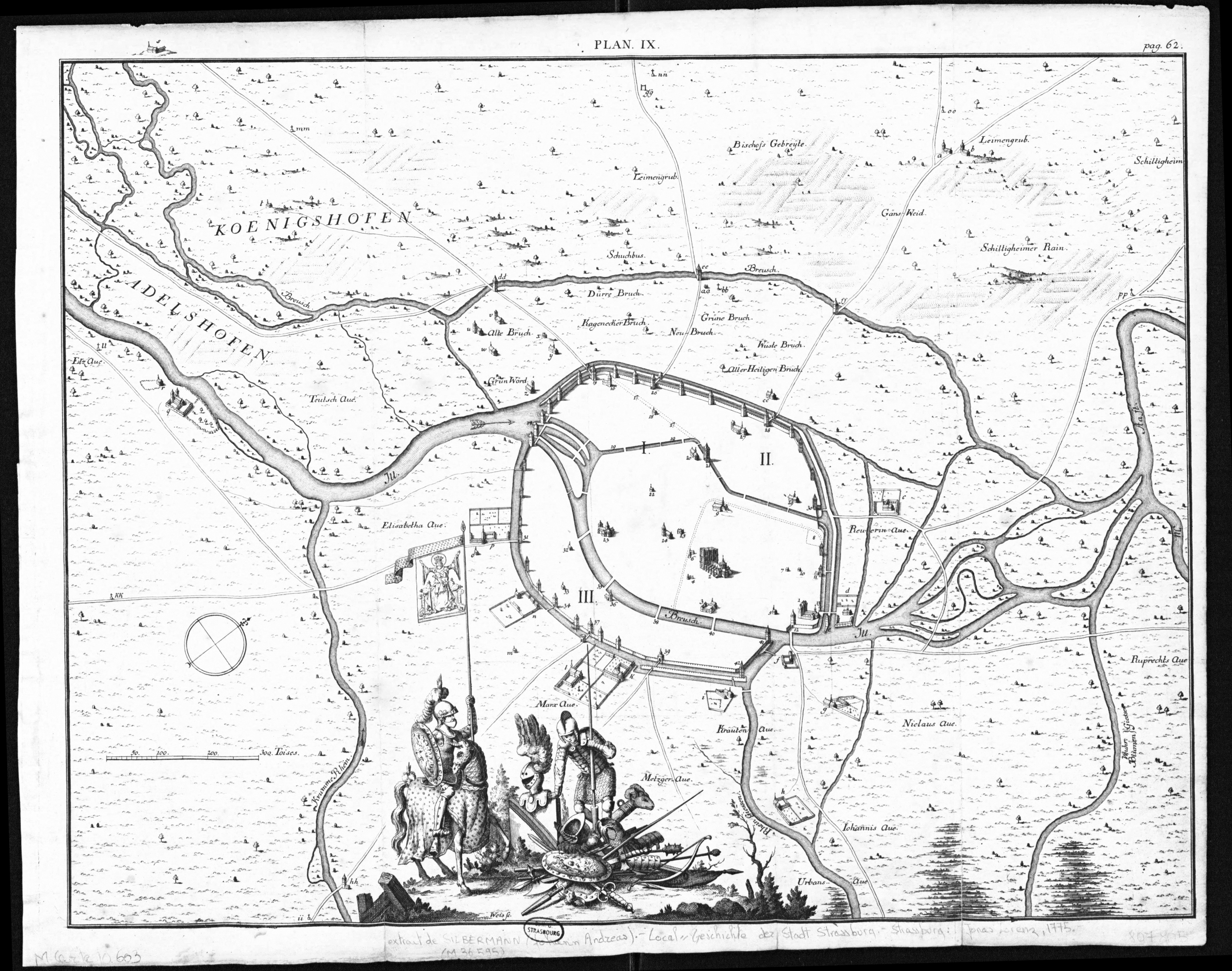 Carte de Strasbourg : troisième extension de la ville vers le XIIIème siècle. Publication 1775. La légende se trouve sur cette image File:Carte de Strasbourg XIII 02.jpg